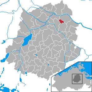 Tutow, Landkreis Demmin, Mecklenburg-Vorpommern